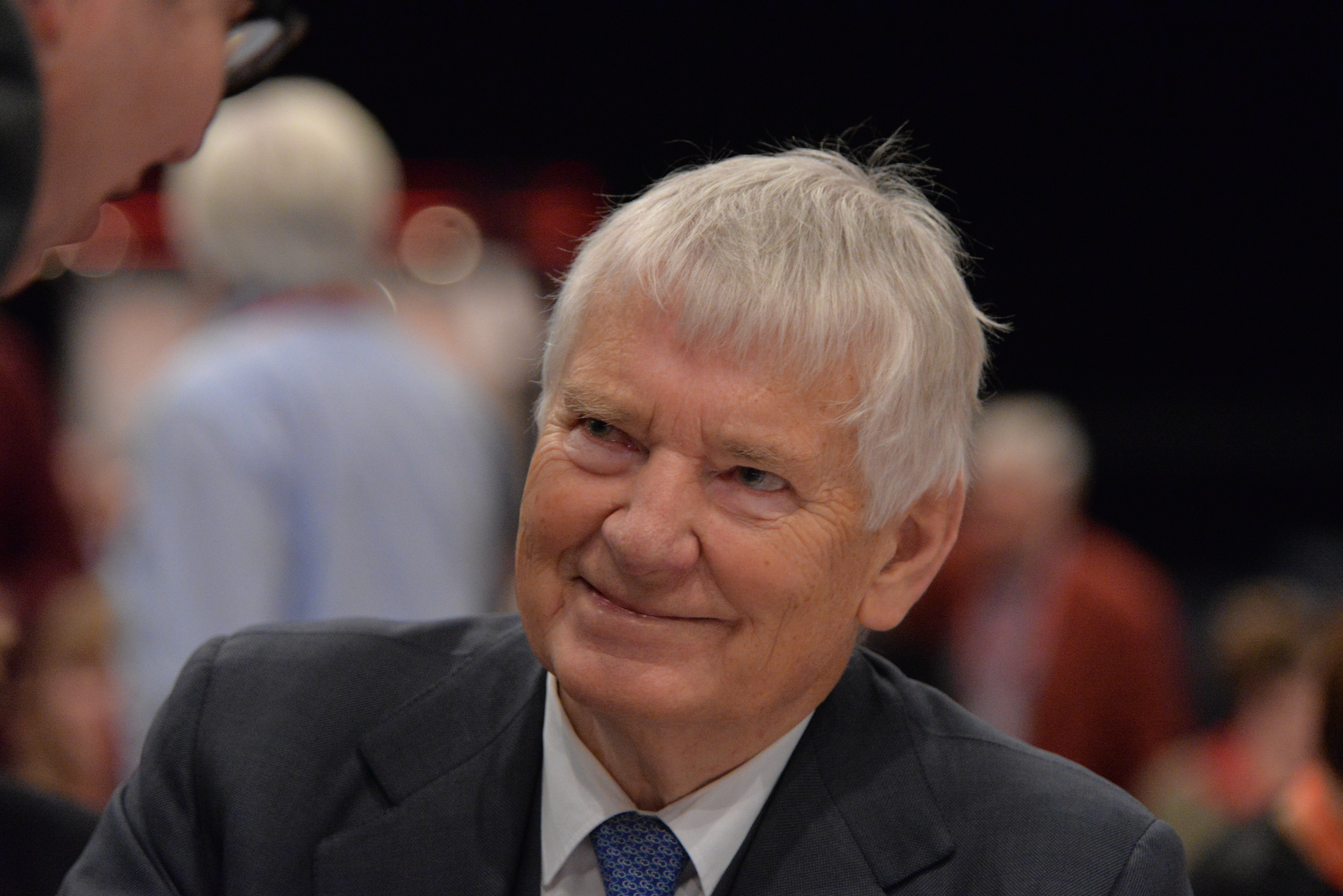 Otto Schily auf dem SPD Bundesparteitag Berlin, 10.-12. Dezember 2015, CityCube, Messe Berlin